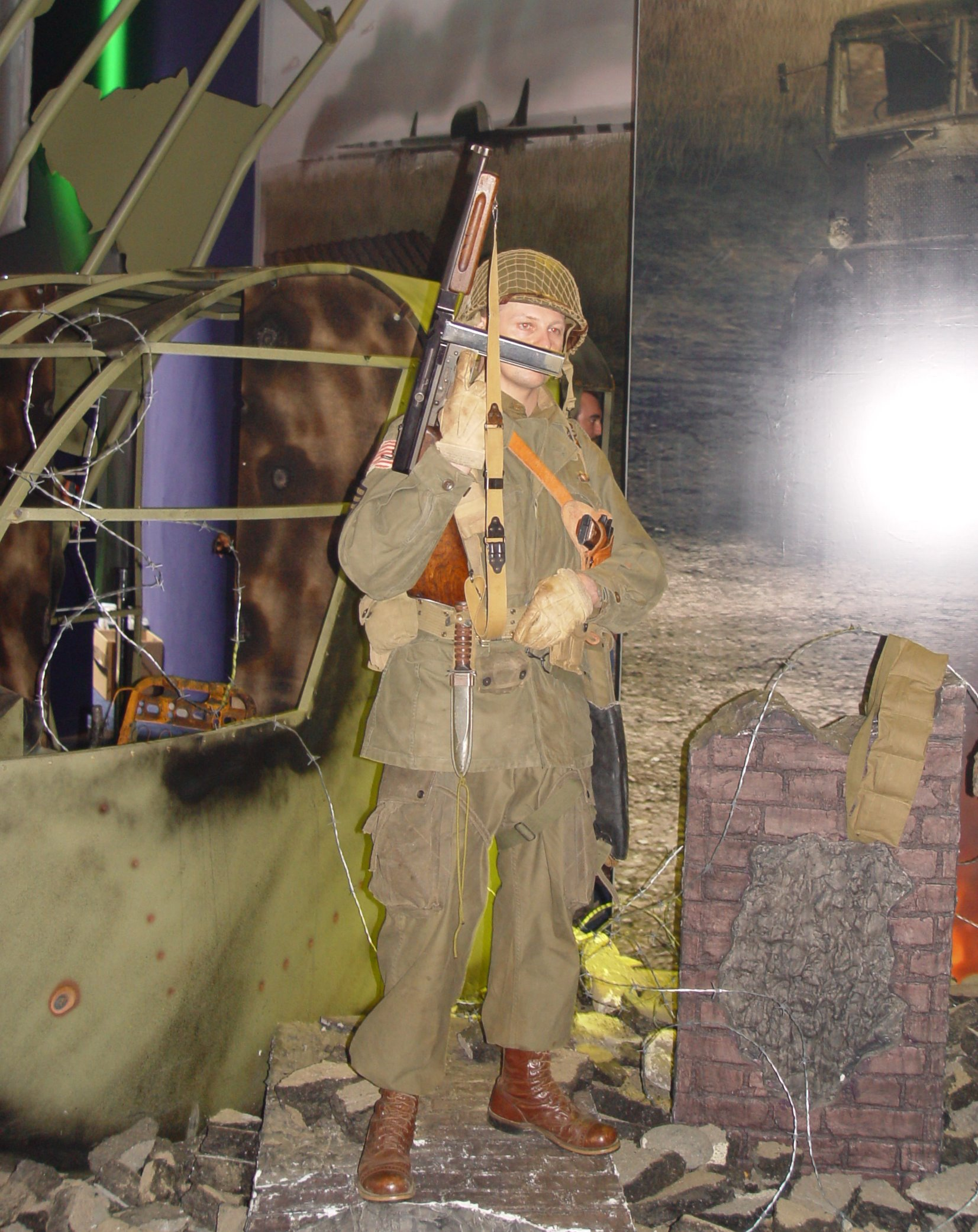 Soldier boy